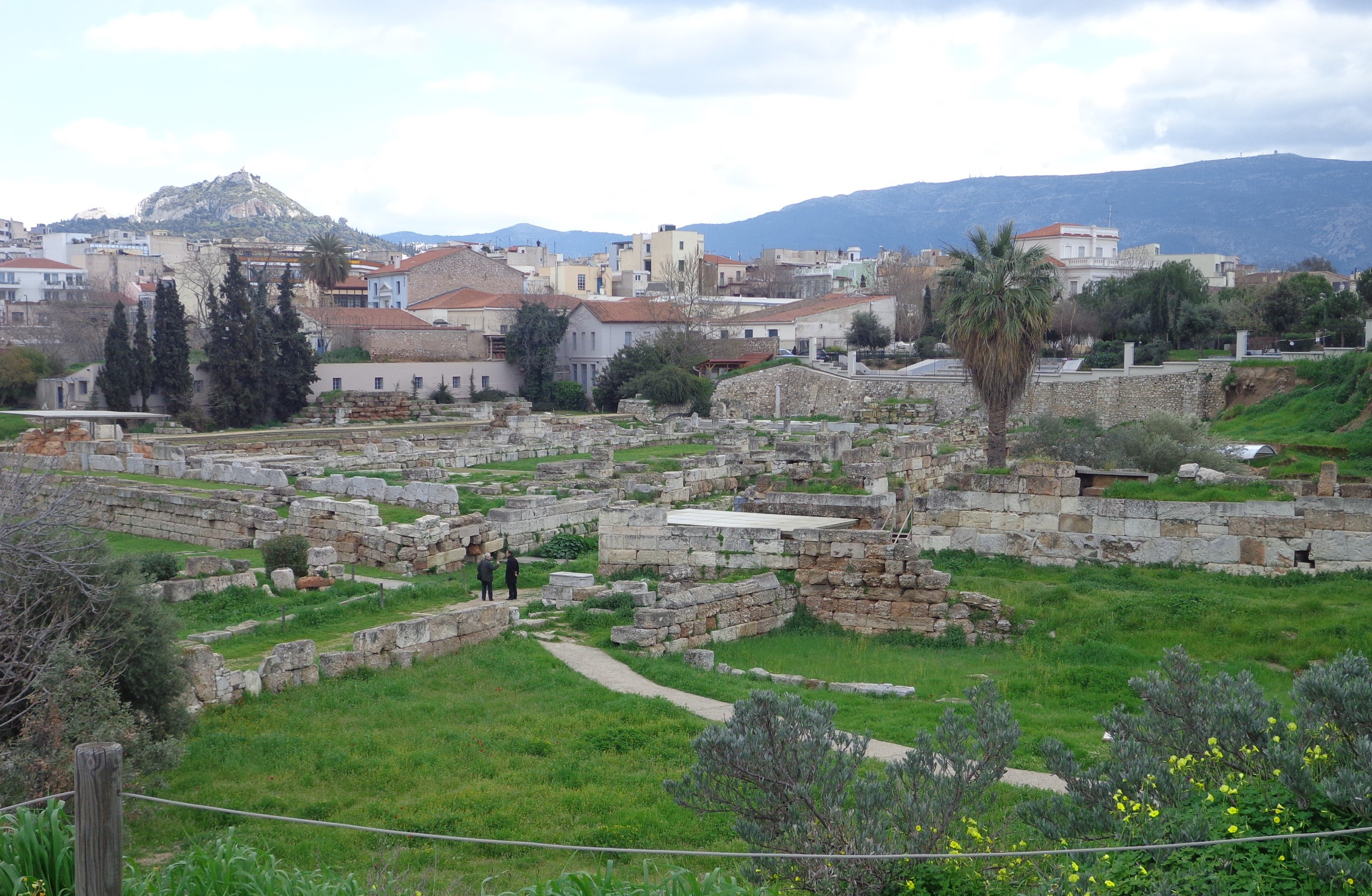 Κεραμεικός«Κεραμεικός»